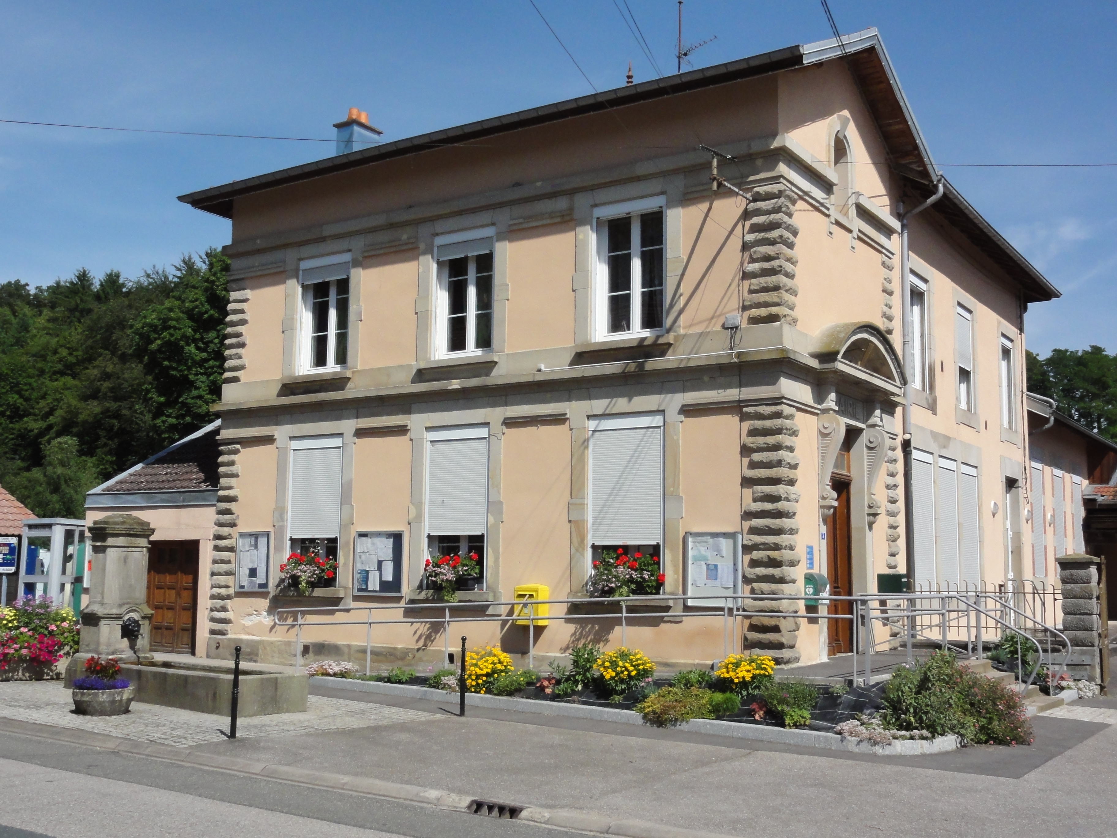 Bréménil (M-et-M) fontaine et mairie